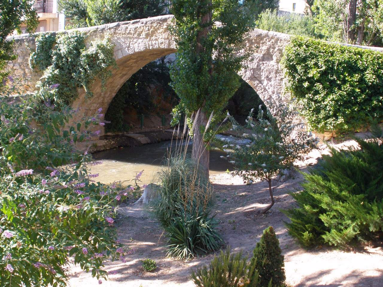 Aranda de Duero -Puente Románico de las Tenerías